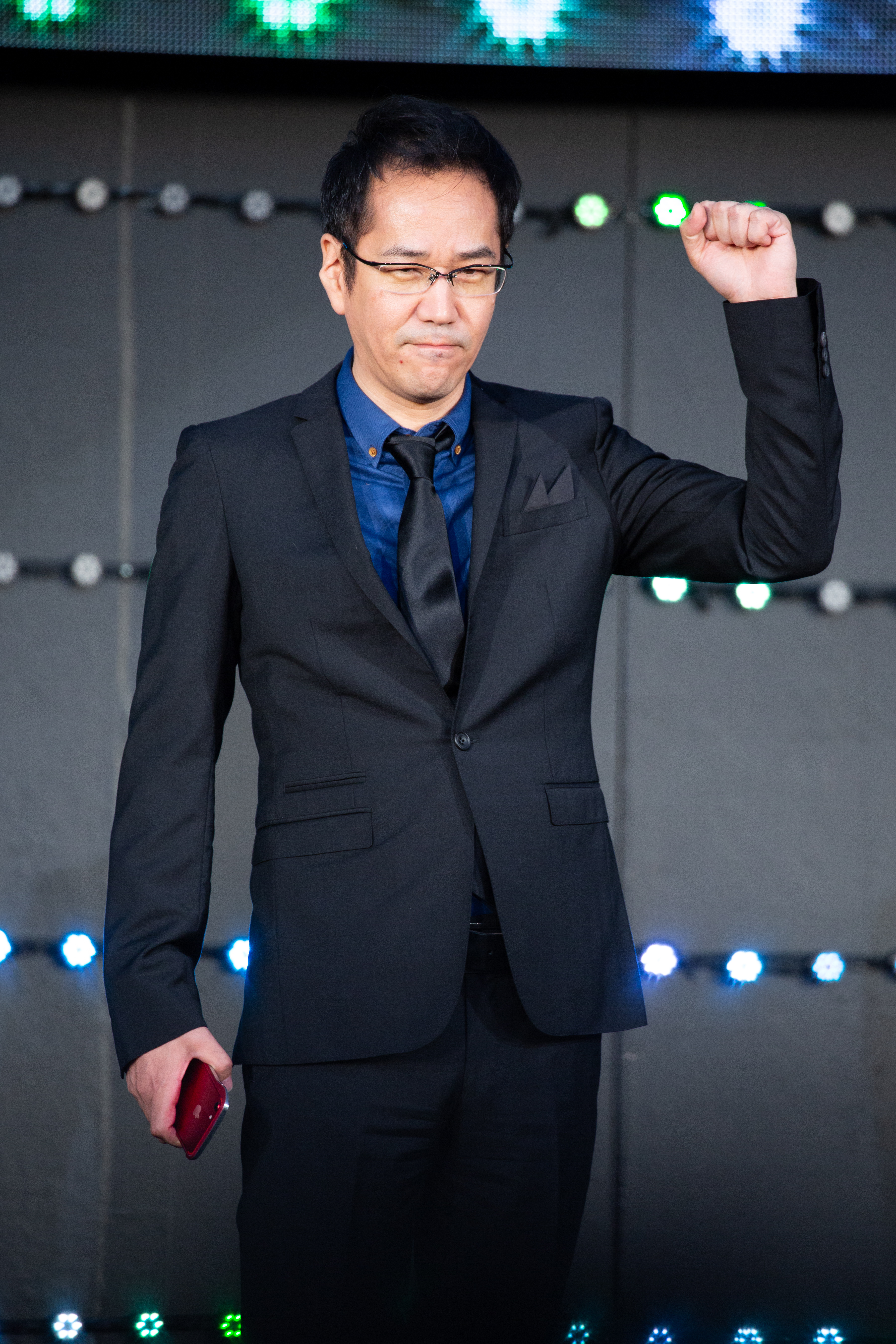 レディ・プレイヤー1 ジャパン・プレミア レッドカーペット 神山健治